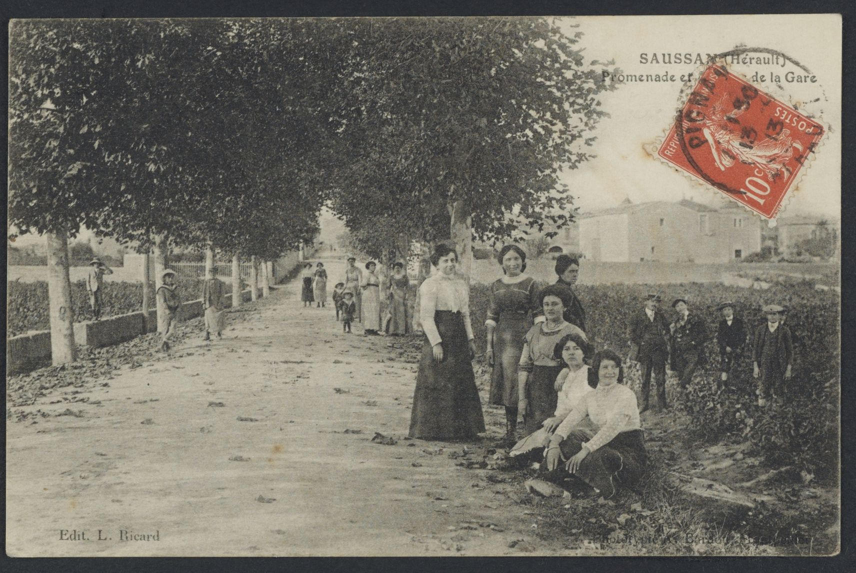 Saussan. - Promenade et avenue de la gare : carte postale